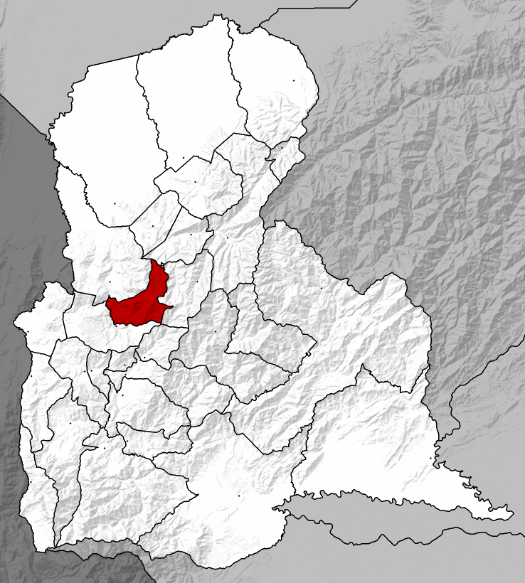 Municipio Michelena - Táchira